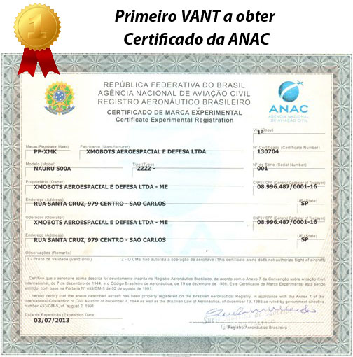 Certificado concedido pela Agência Nacional de Aviação Civil (ANAC) ao VANT Nauru.